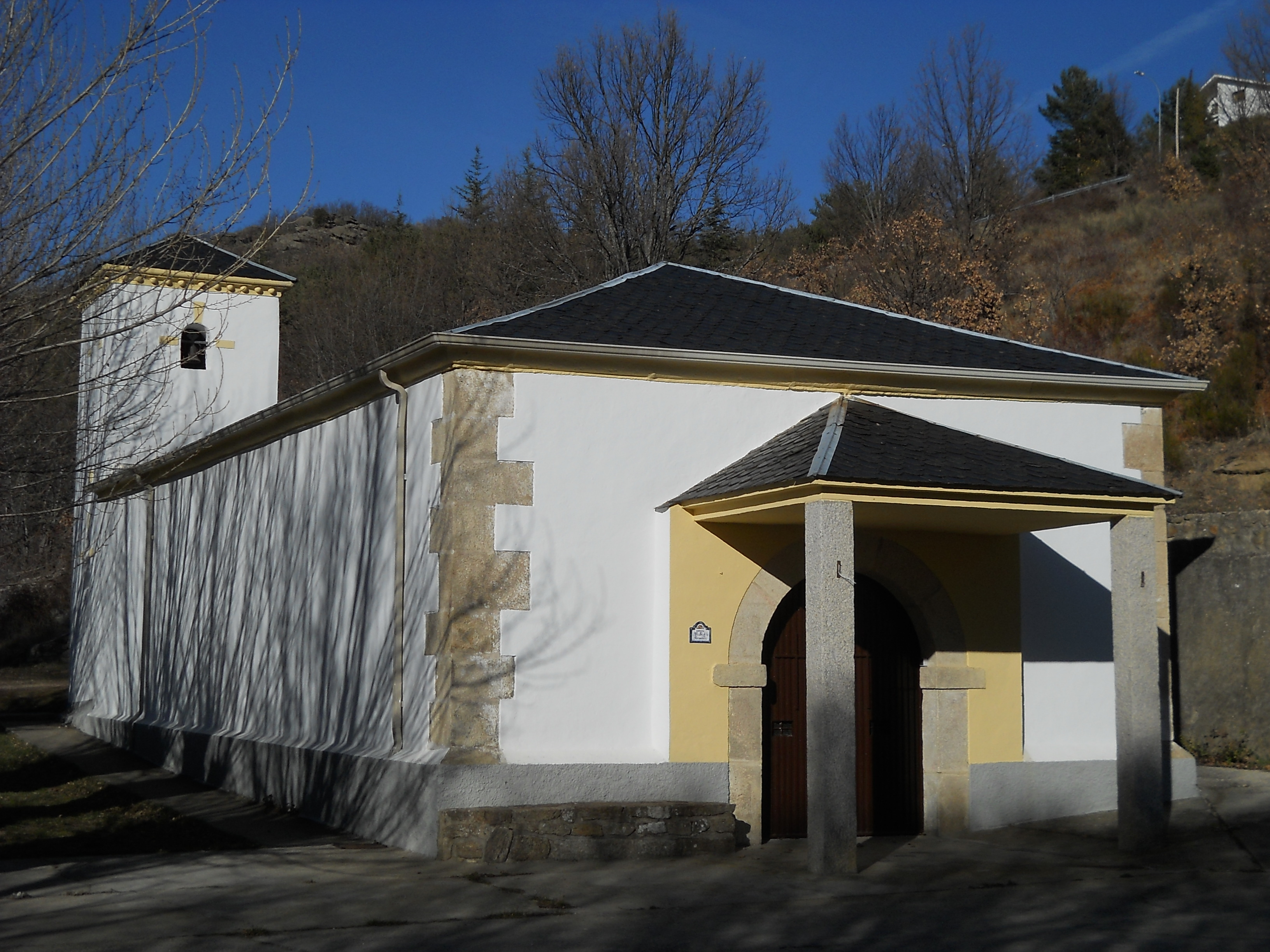 Ermita de la Fuensanta, Lozoya, Madrid, España